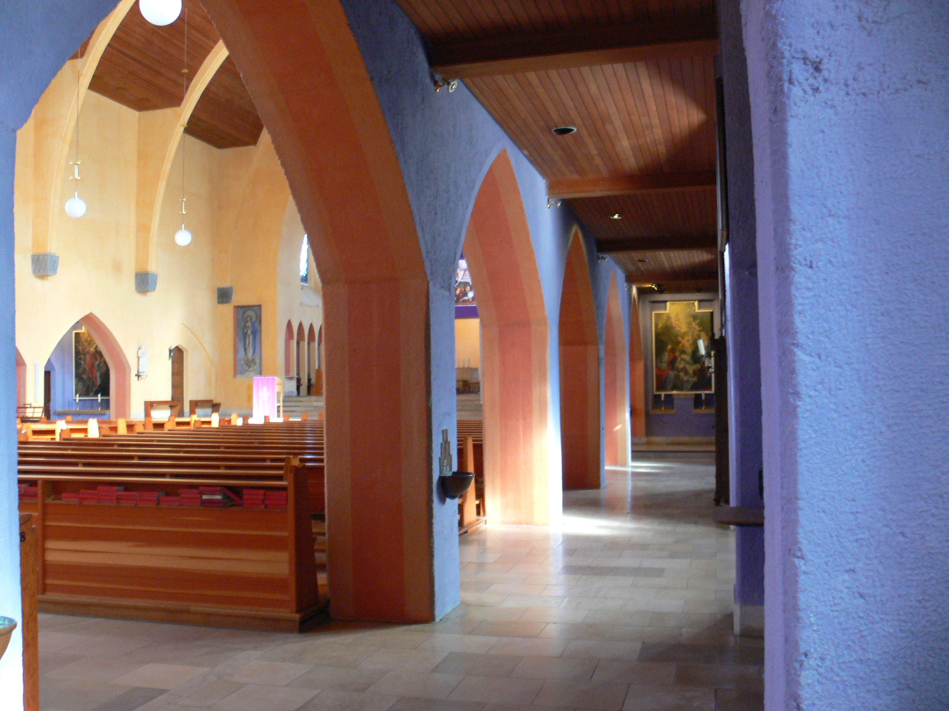 Friedrichshafen, Pfarrkirche St. Petrus Canisius